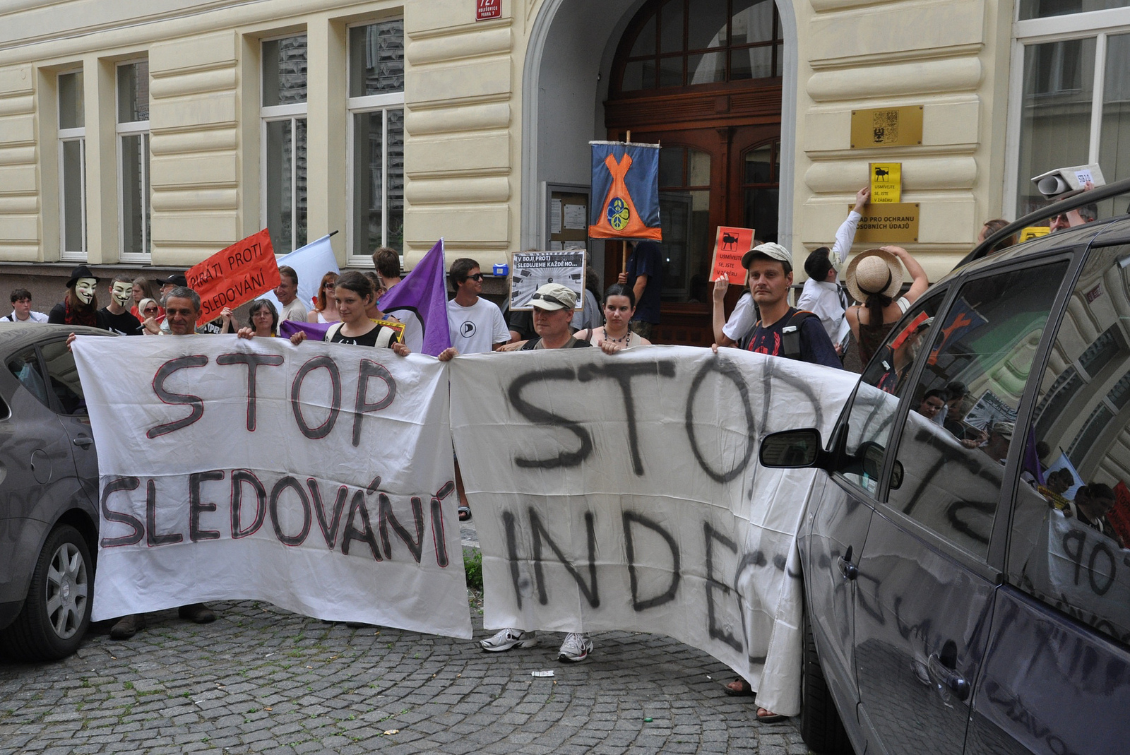 Protest proti projektu 28. 7. 2012 v Praze konaný Českou pirátskou stranou